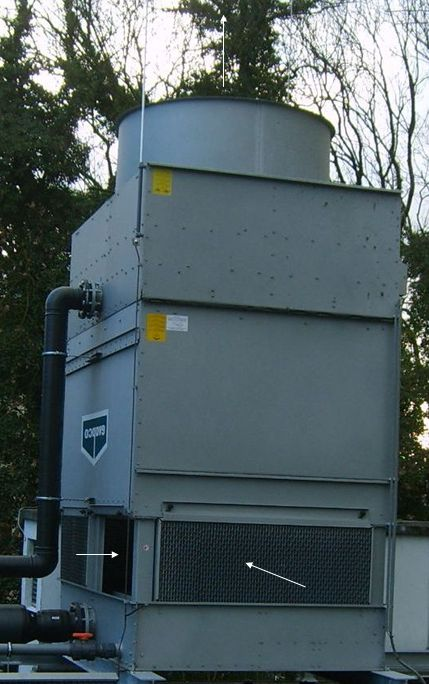 foto van koeltoren met geforceerde luchtstroom